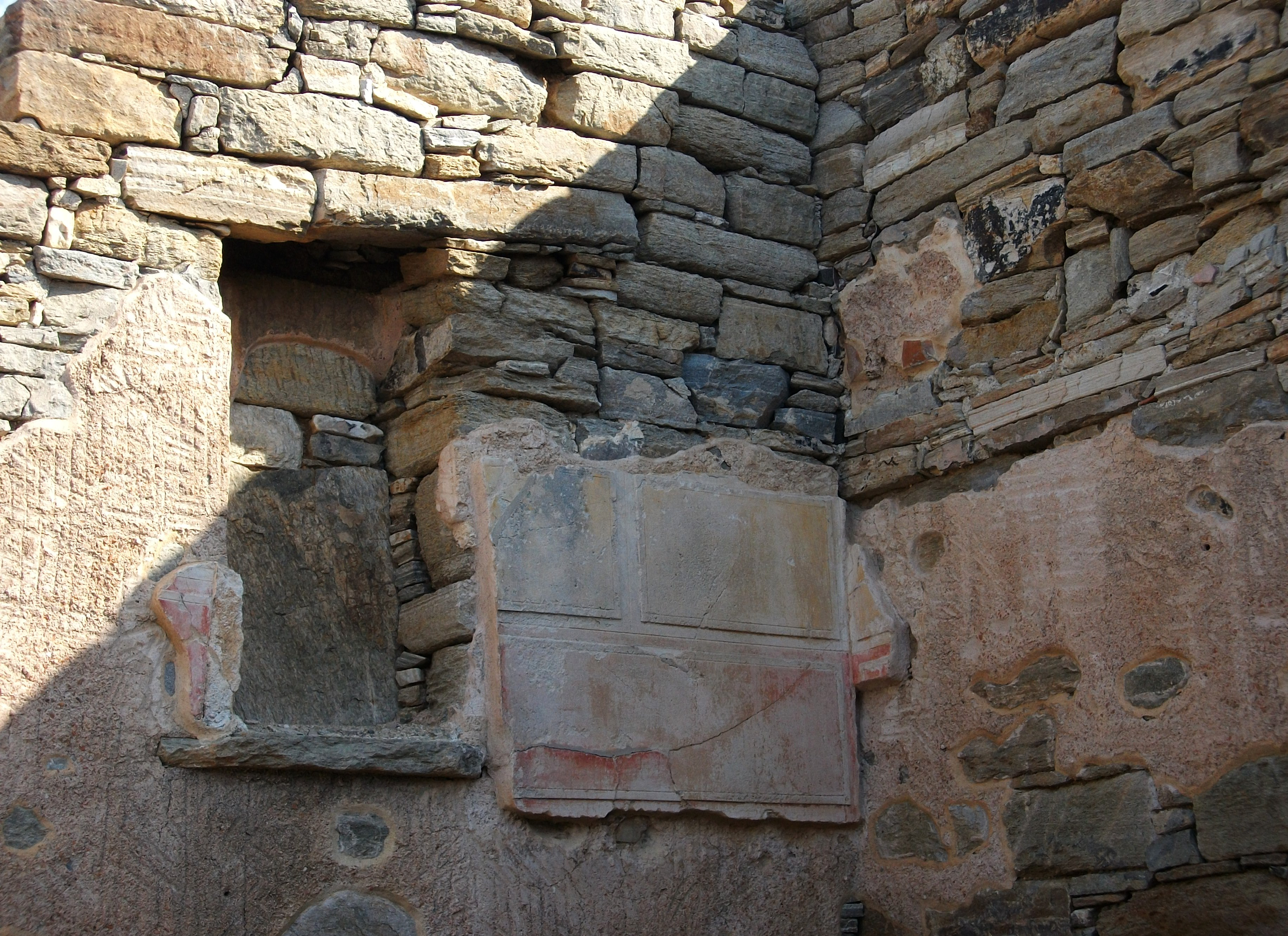 Casa de Dionís de Delos, interior.